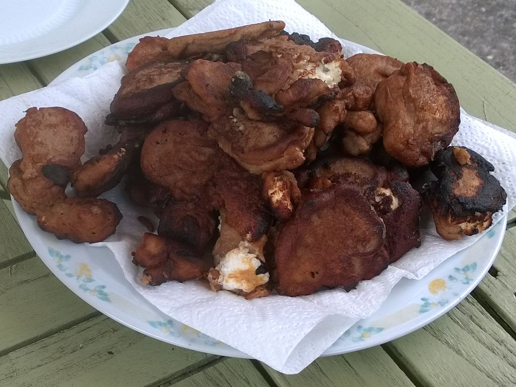 Corsu: Friteddi castagnini